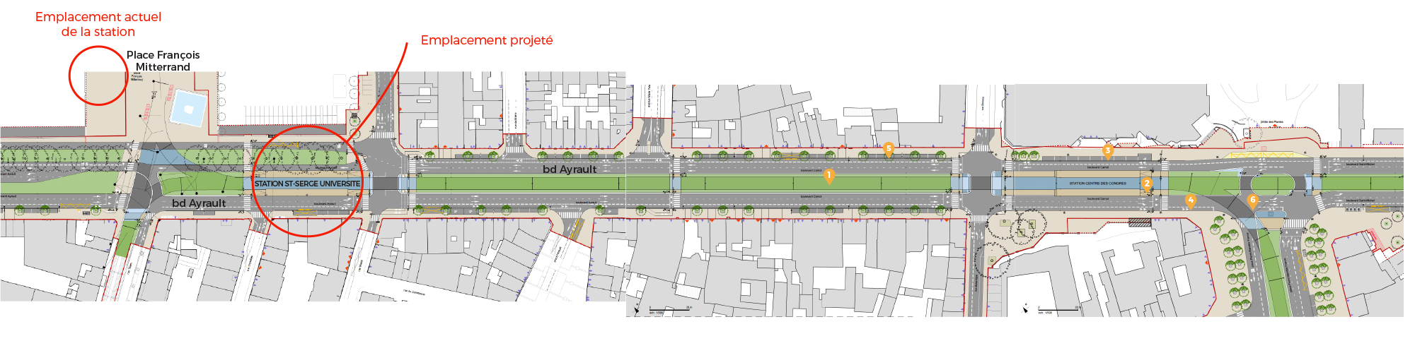 plan des future ligne de Tramway ligne A et B Boulevard Carnot centre ville Angers